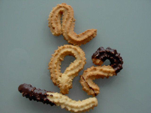 Spritzgebäck - German Christmas cookies